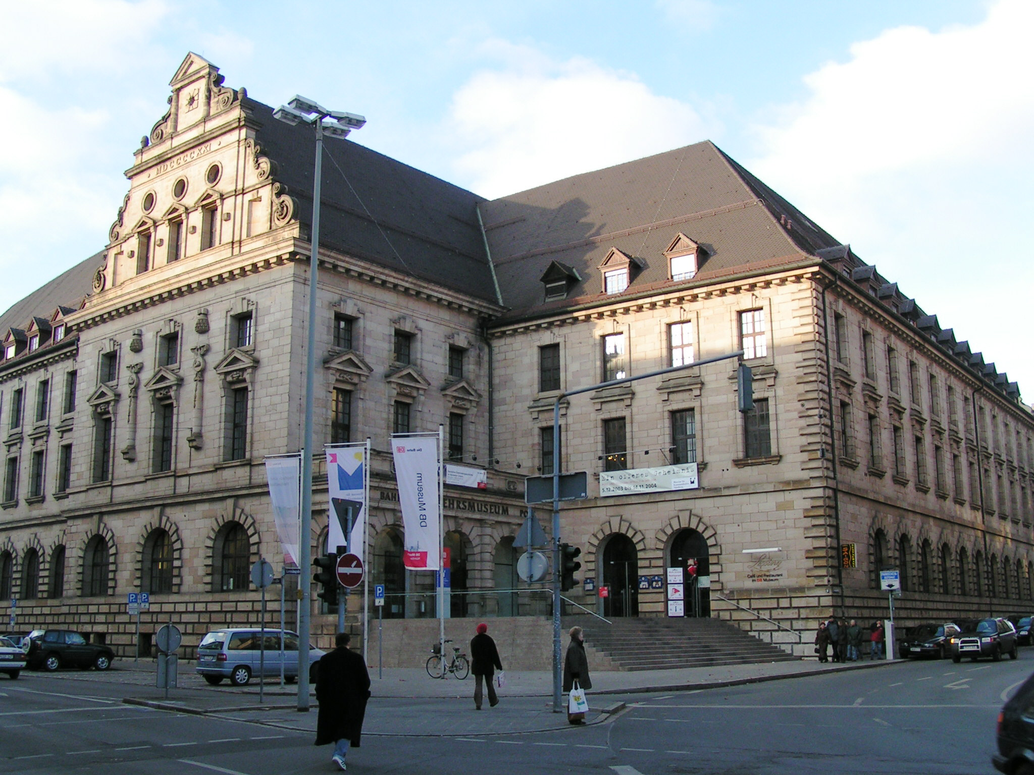 Verkehrsmuseum Nürnberg (Transportation museum) Nuremberg, Germany